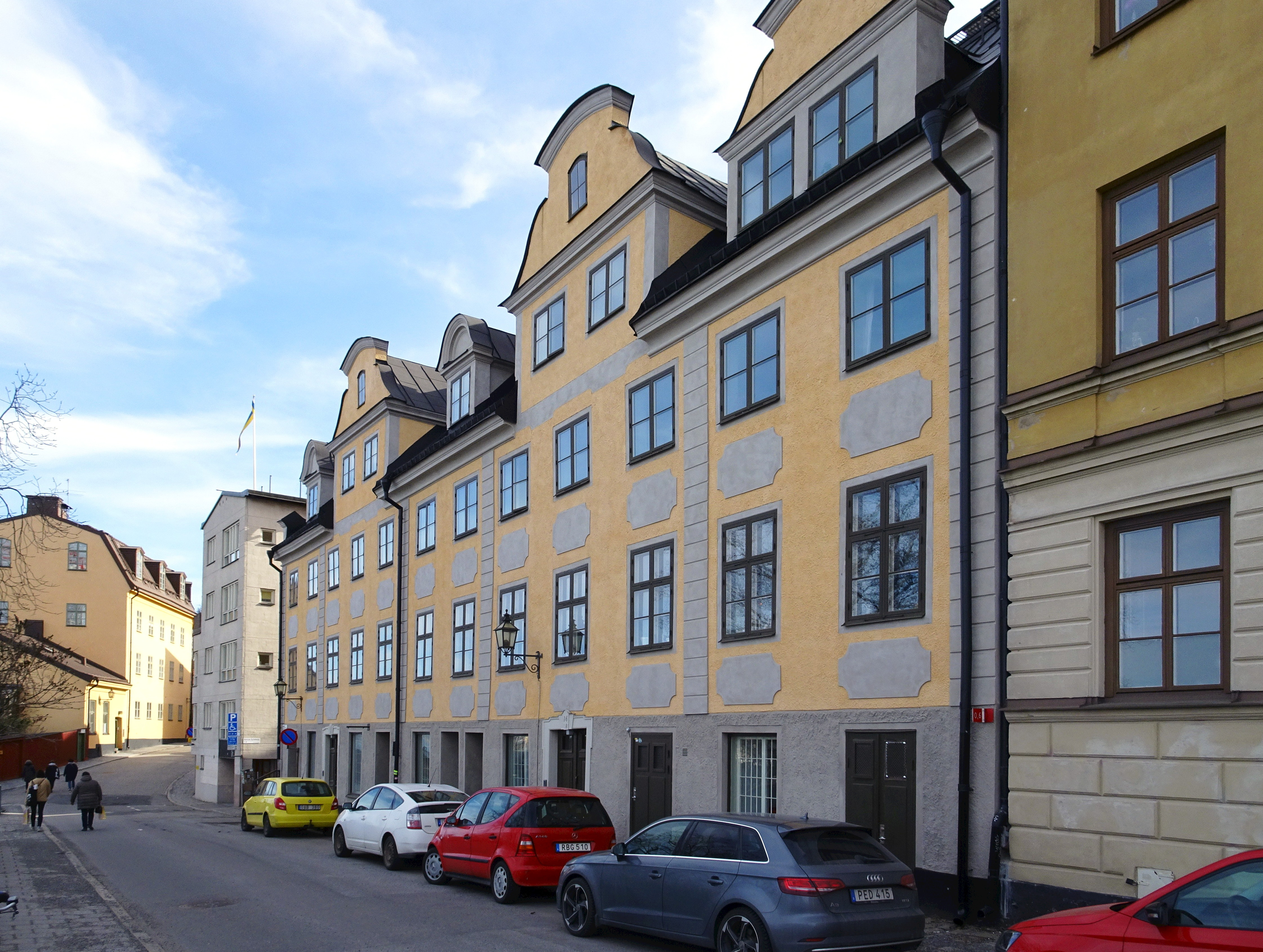 Elias Kuhlmans hus från Klevgränd